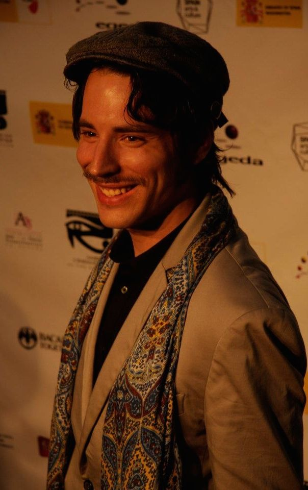 Spanish Cinema Red Carpet Event @ The Egyptian Theatre in Hollywood